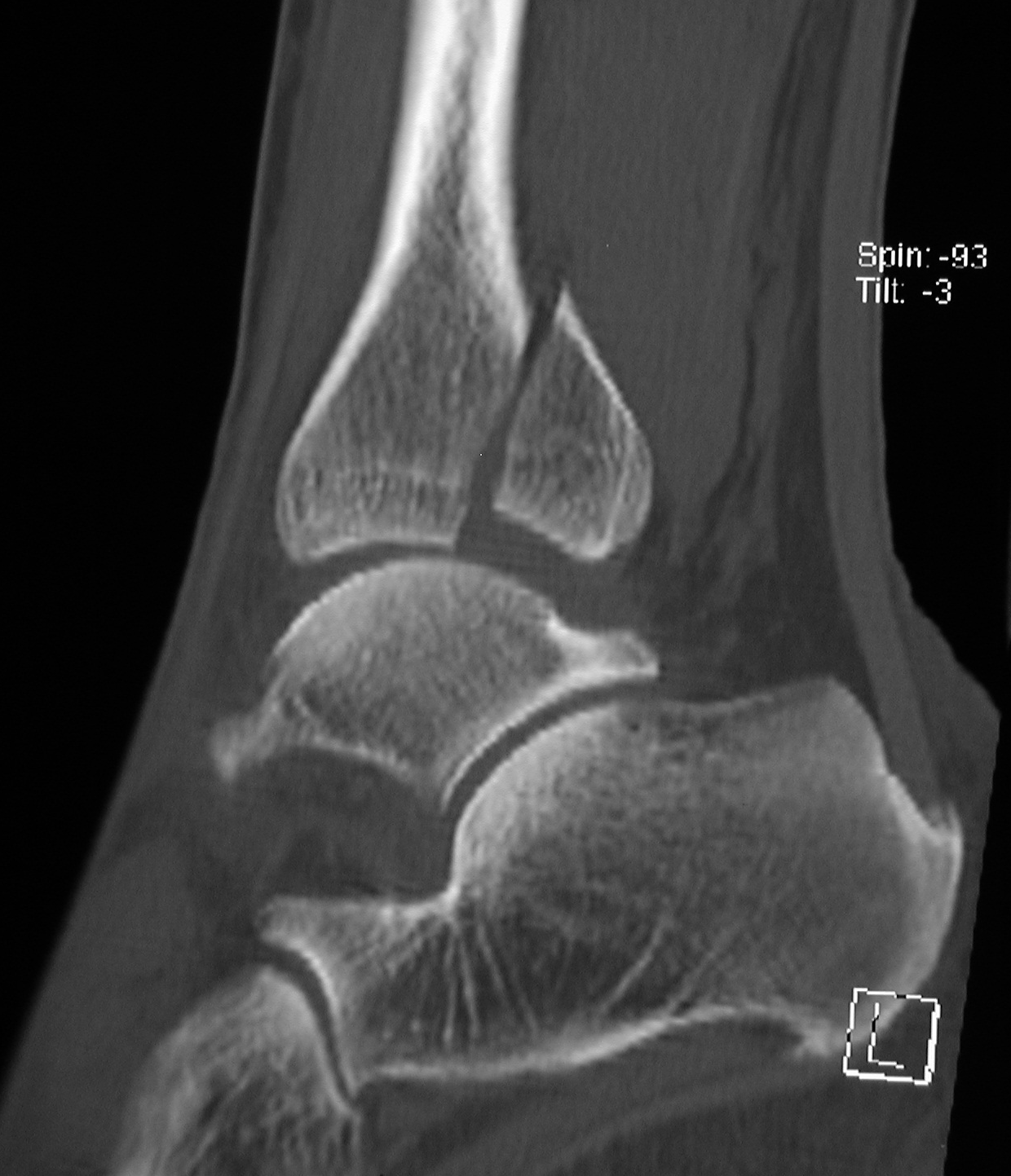 großes Volkmannsches Dreieck im CT